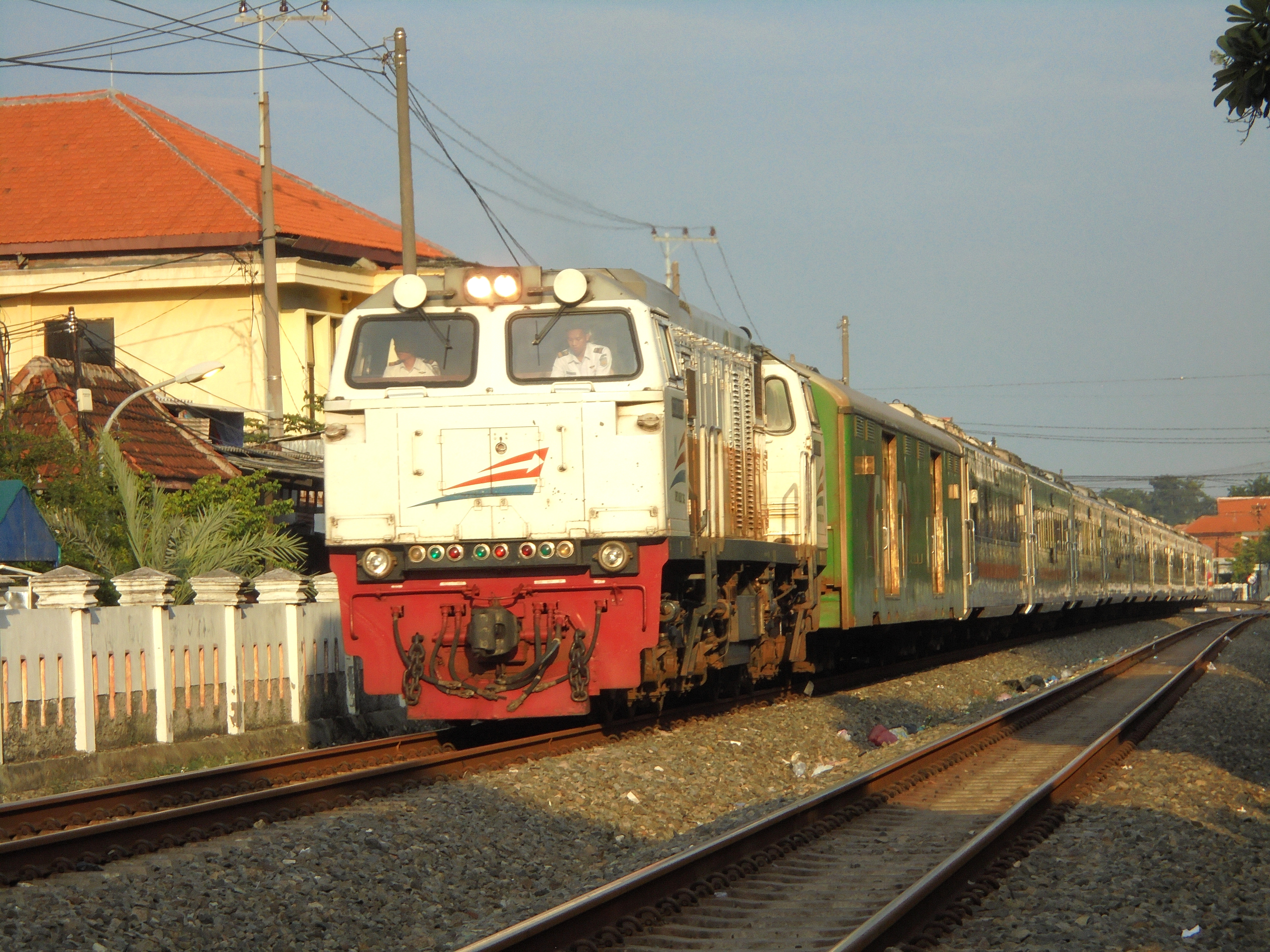 Kereta api Harina saat melintas di Tembok Dukuh, Bubutan, Surabaya